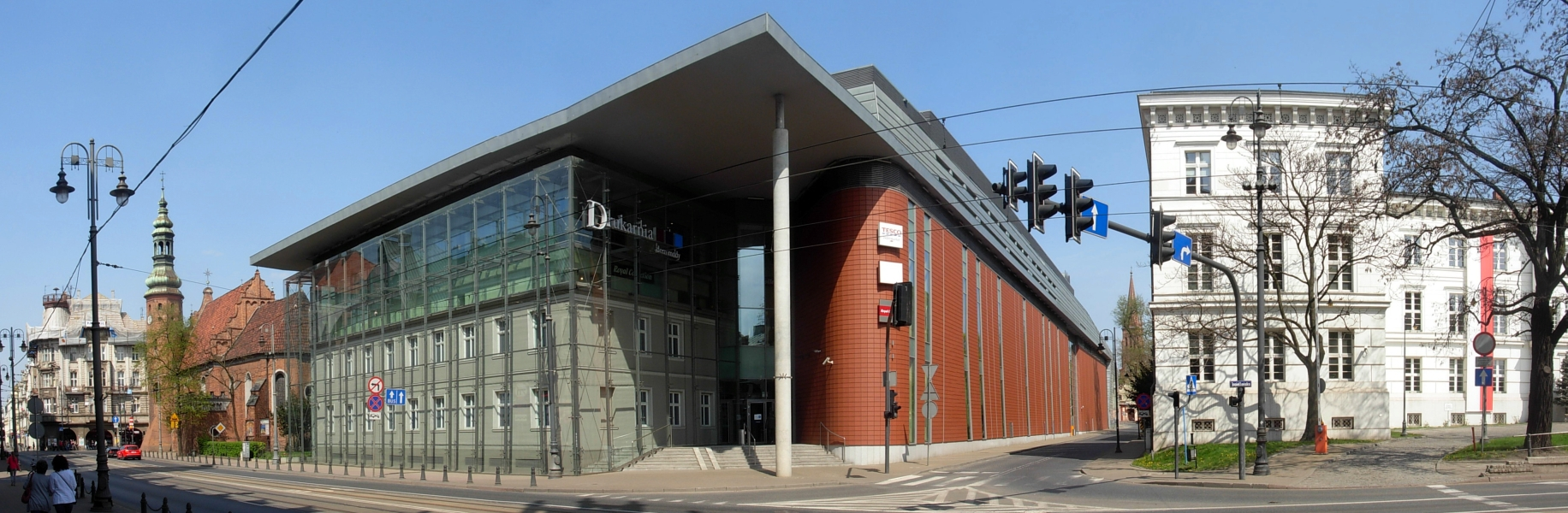 Dom Mody Drukarnia w Bydgoszczy - widok od ul. Jagiellońskiej